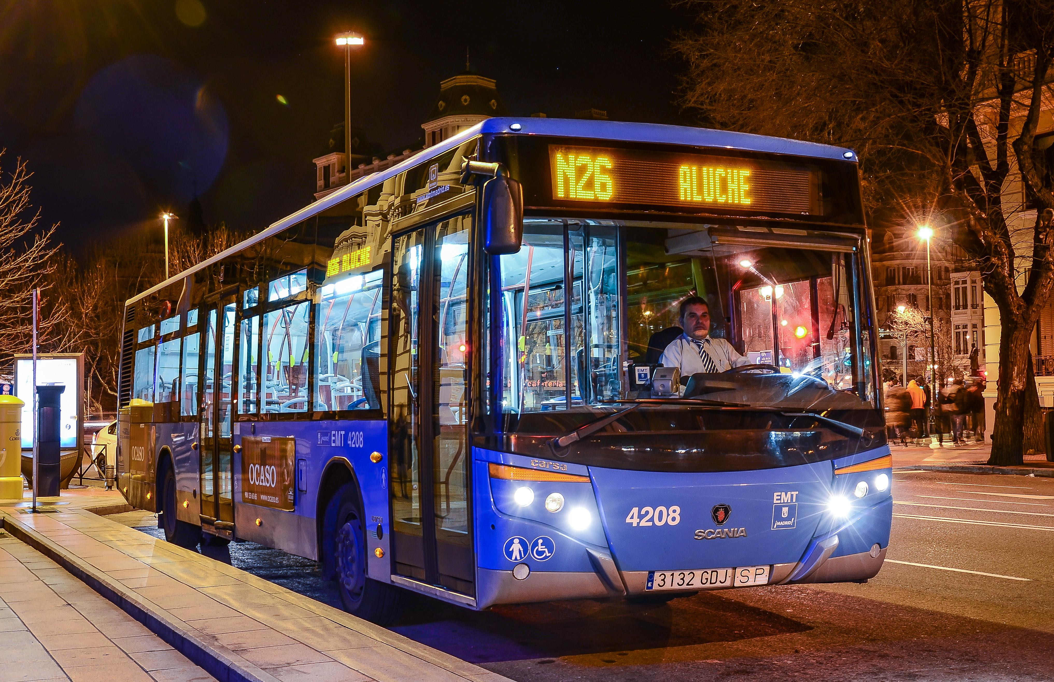 La Empresa Municipal de Transportes de Madrid ha previsto un dispositivo de refuerzo especial de su red de líneas de autobuses nocturnos al objeto de dar respuesta al incremento de viajeros que se produce durante los fines de semana del periodo navideño, es decir, desde mañana jueves 14 de diciembre hasta el domingo 7 de enero.